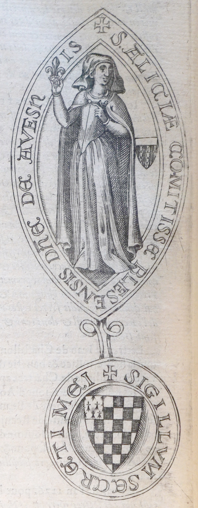 Alice_comtesse_Belesme_Avesne_par andré_du_Chesne.